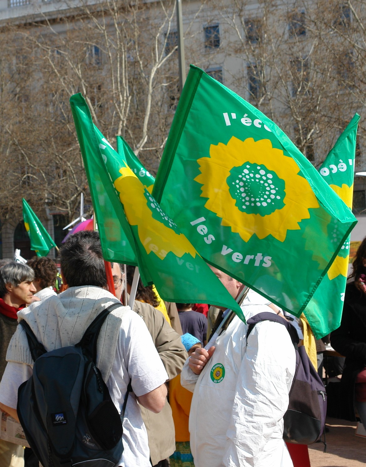 Manifestation contre l'EPR, Lyon, 17 mars 2007, place Bellecour. Drapeaux des Verts.